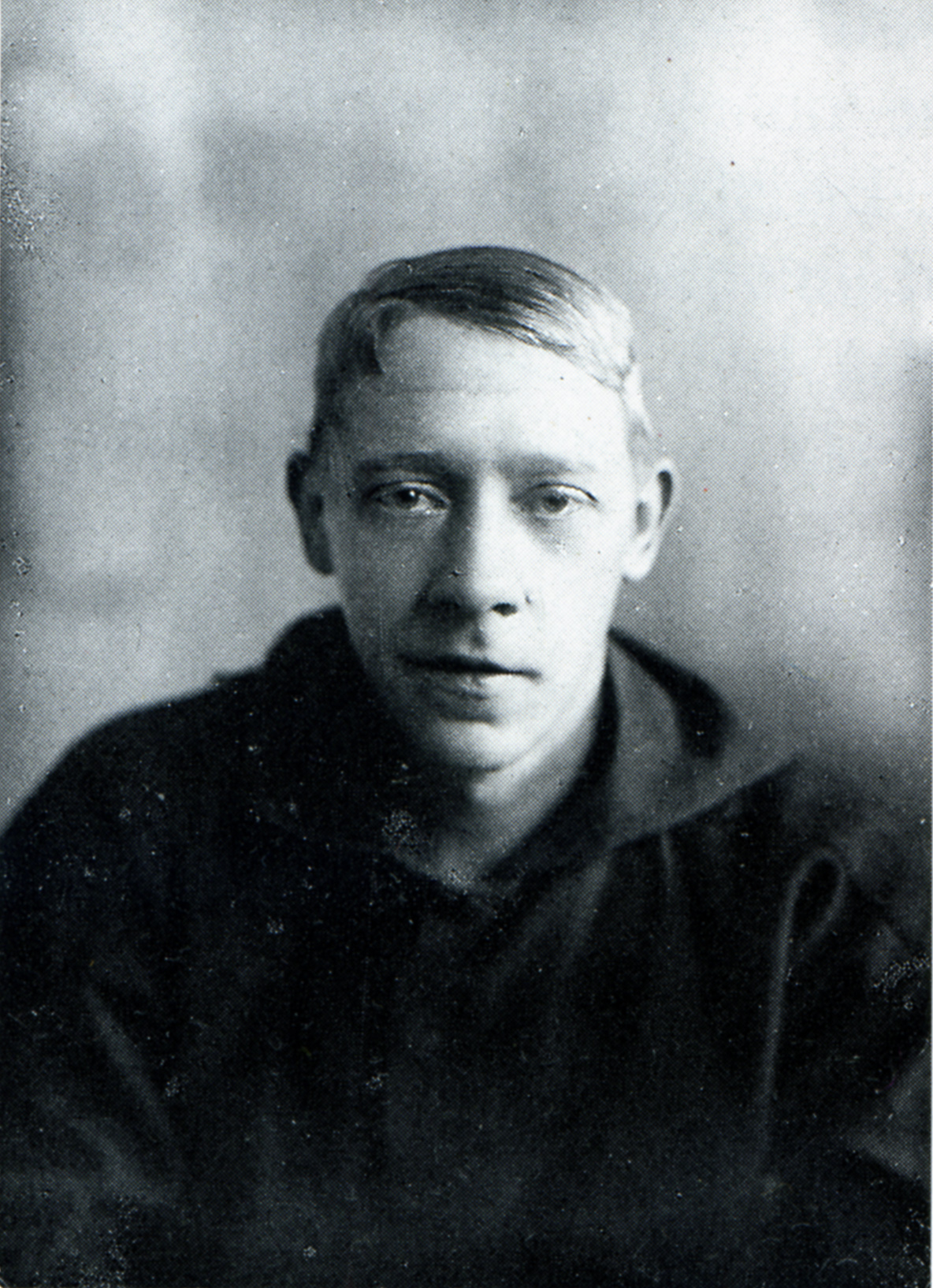 Vladimir Tatlin als Matrose.